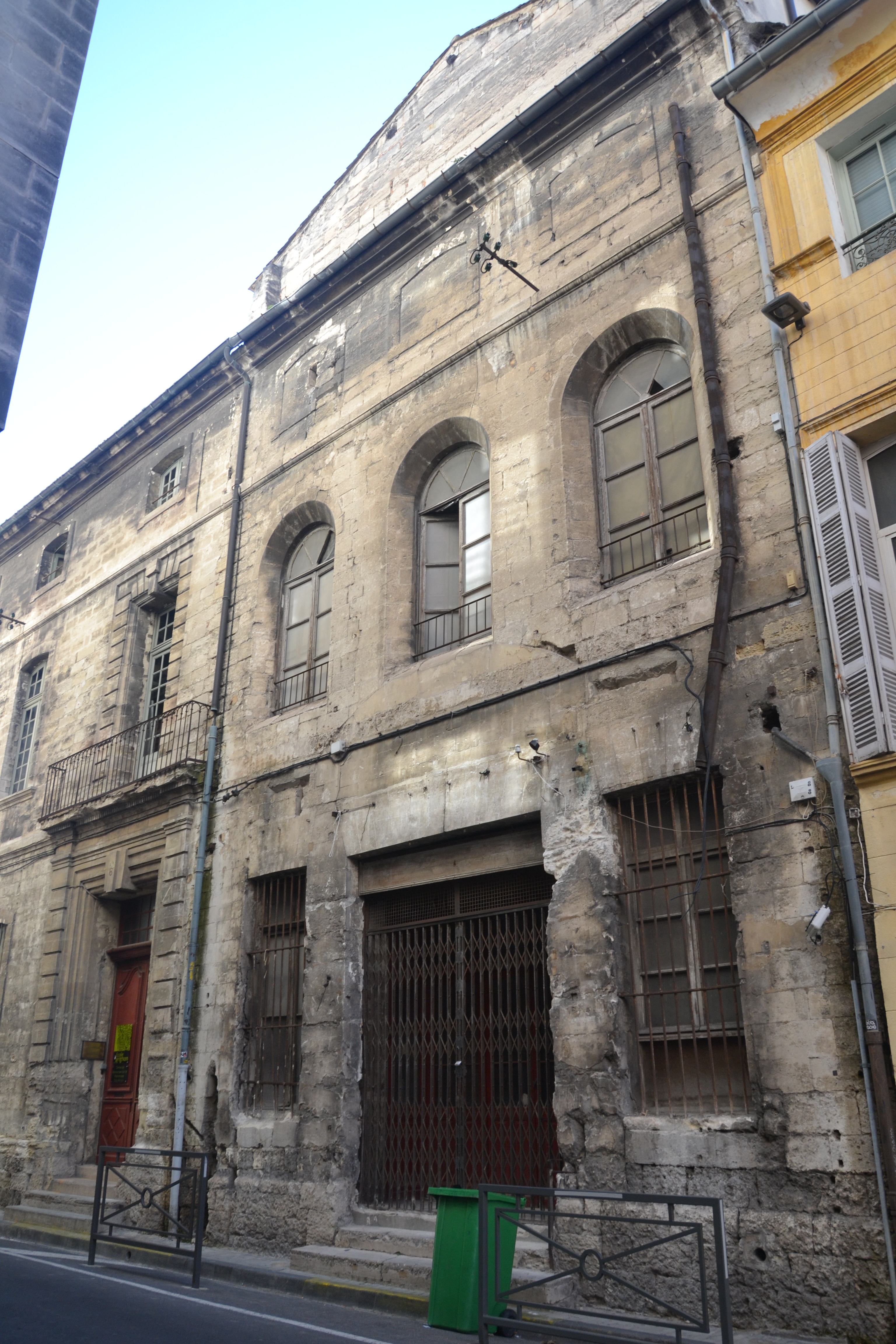 Maison du roi Renémaison, décor intérieur